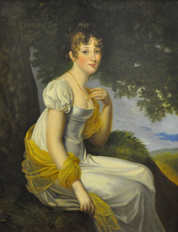 Портрет великой княжны Анны Павловны (копия XIX века с картины Вальтера)